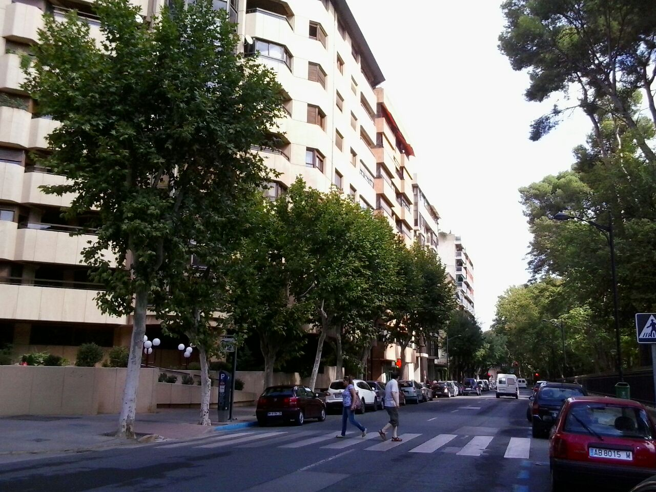 Paseo de Pedro Simón Abril. Parque Abelardo Sánchez. Centro. Albacete